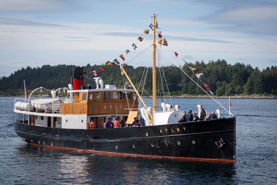 MS Atløy seiler inn på havnen i Florø under Fjordsteam 2015.